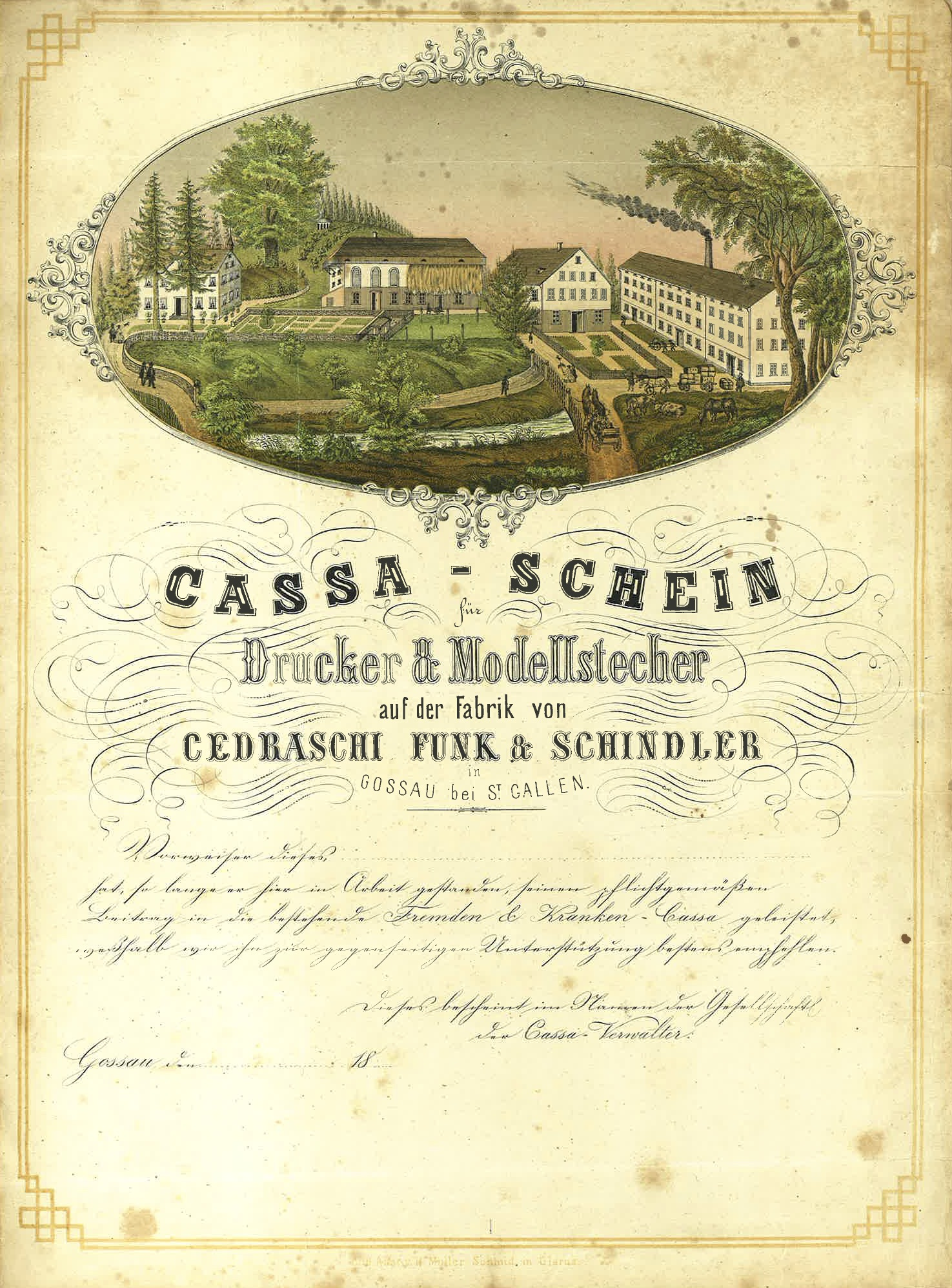 Cassa-Schein für Drucker und Modellstecher der Türkischrotdruckerei Cedraschi, Funk und Schindler in Gossau, St. Gallen - vormals J.J. Kelly - Mitgliedschaftsbeleg für Kranken- und Unfallkasse der Mitarbeiter